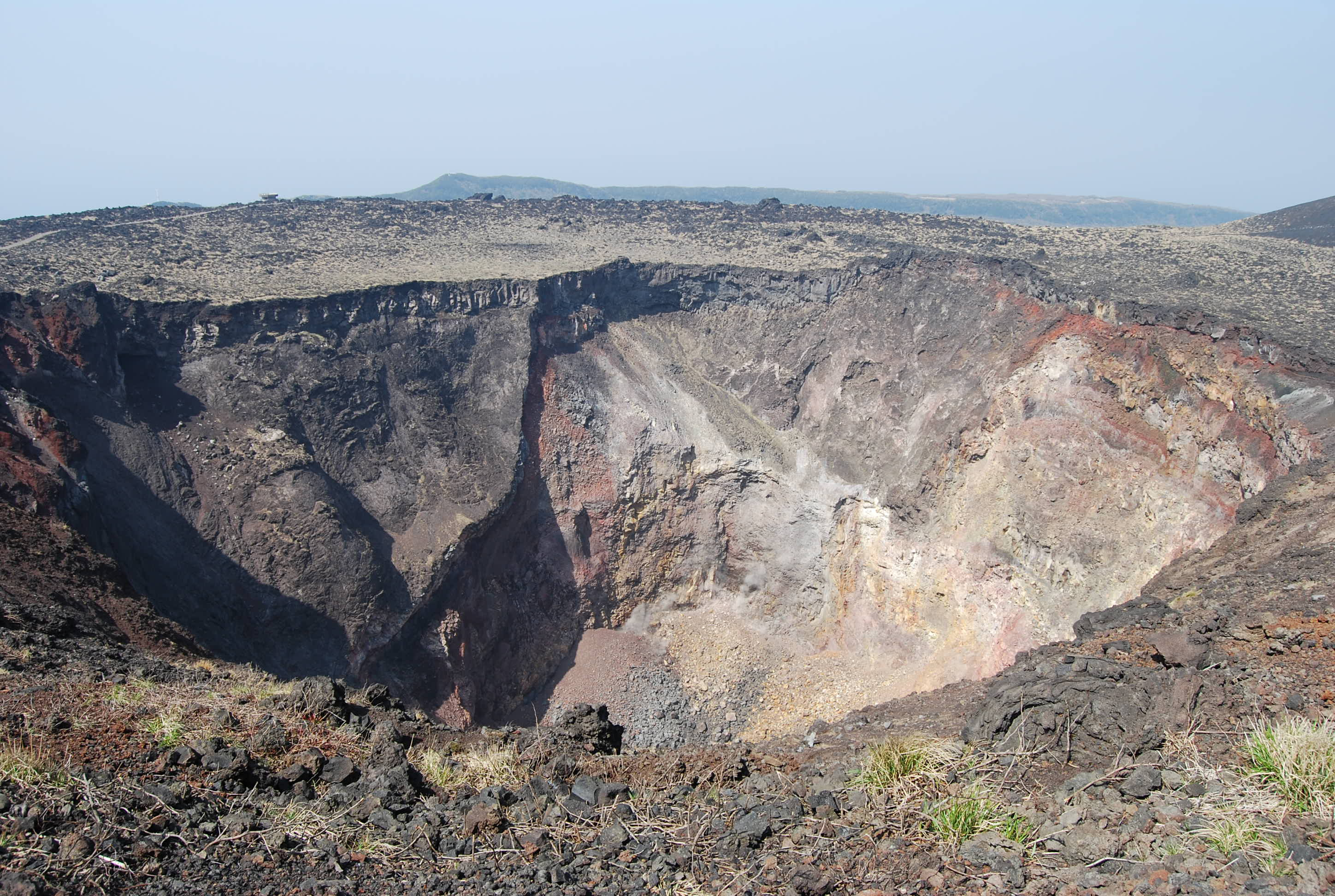 伊豆大島 三原山 山頂